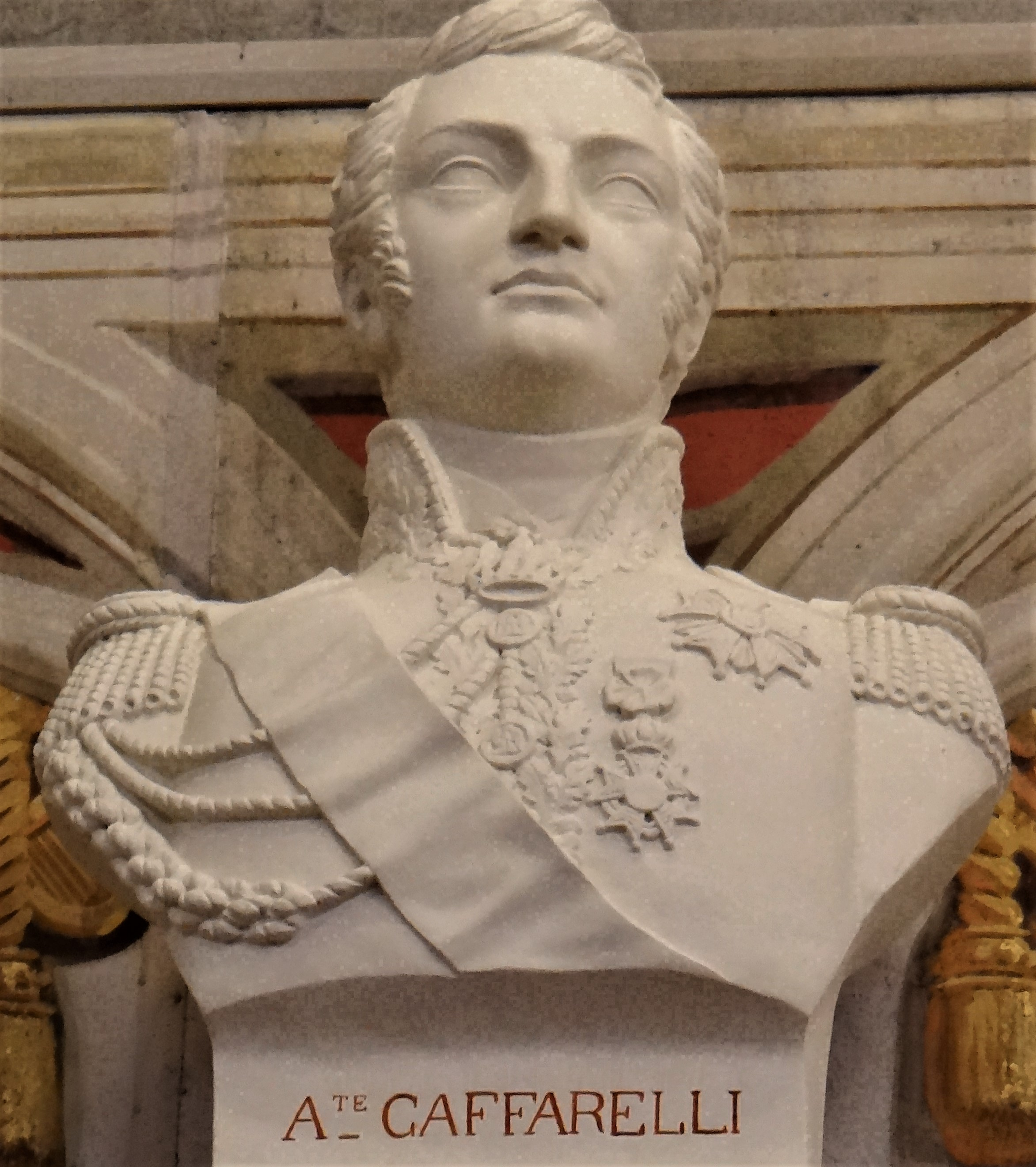 Abbaye-école de Sorèze - Auguste de Caffarelli